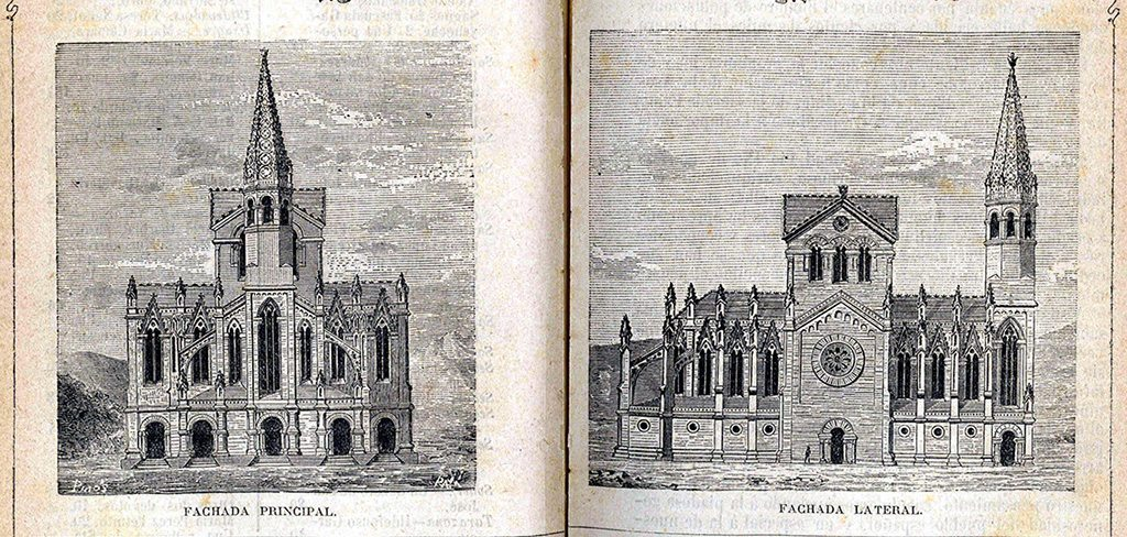 Proyecto de la Sagrada Familia de Francisco de Paula del Villar y Lozano (1882).